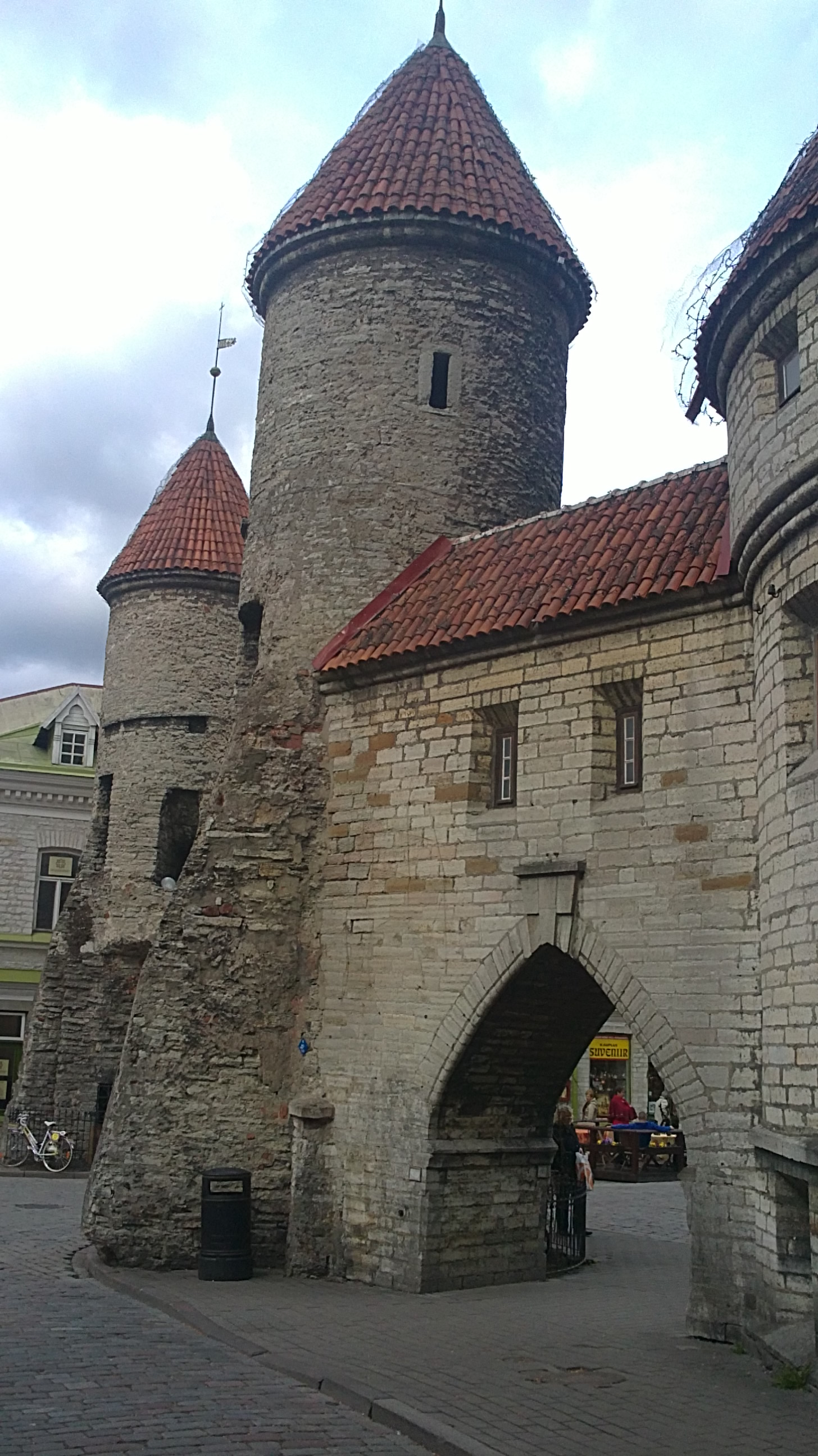 Viru värava eesvärava parempoolne värvatorn, Tallinna vanalinnas, vaade Valli tänavalt